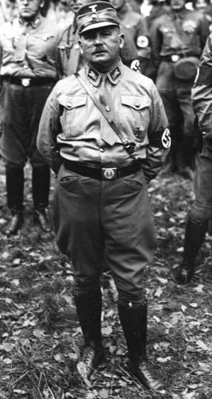 Regierungssturz in Bayern! Hauptmann Röhm der Stabschef der S.A. wurde zum Kommissar zur besonderen Verwendung in Bayern ernannt. Hauptmann Röhm mit Adjudant